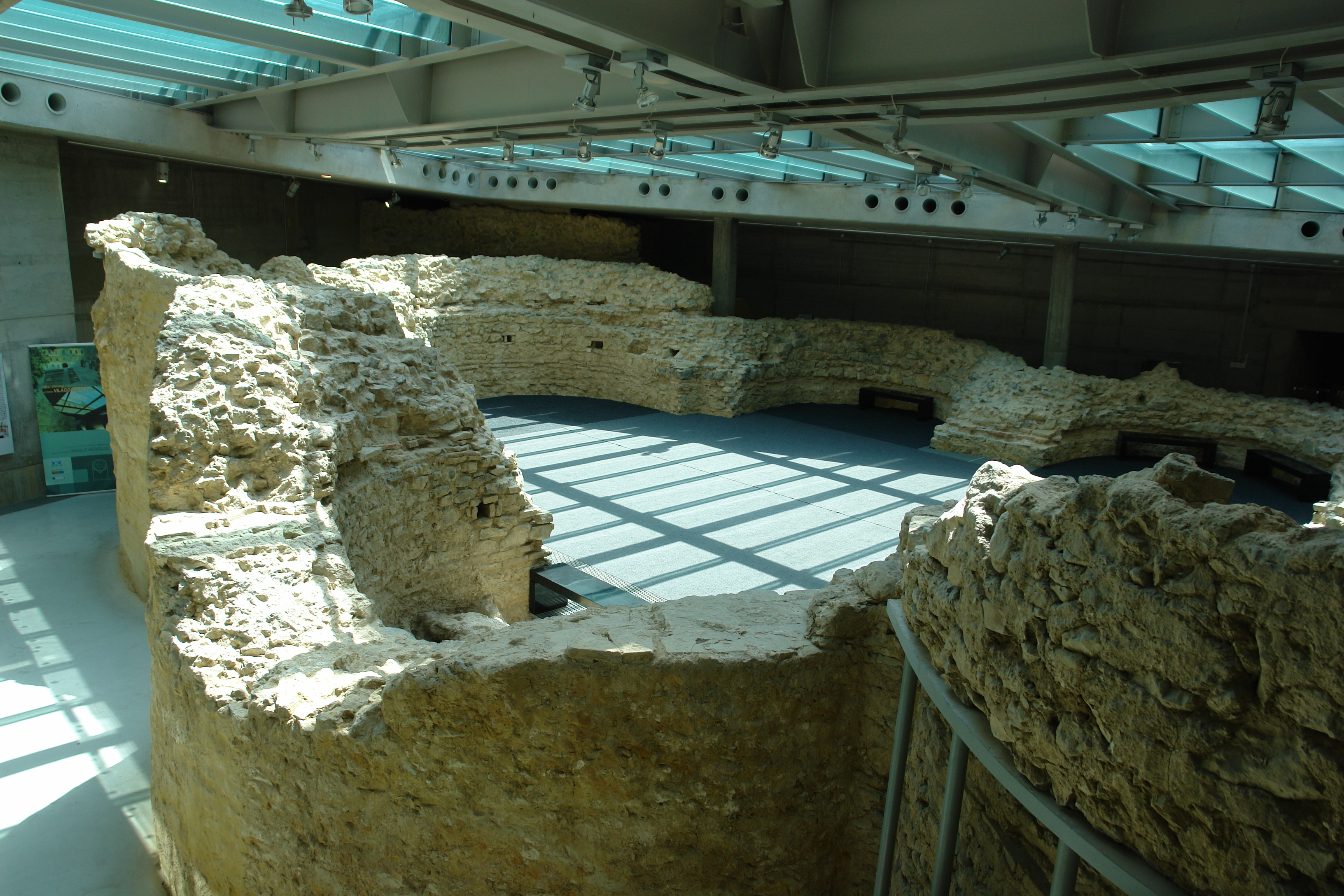 ókeresztény sírkápolna This is a photo of a monument in Hungary. Identifier: 1640